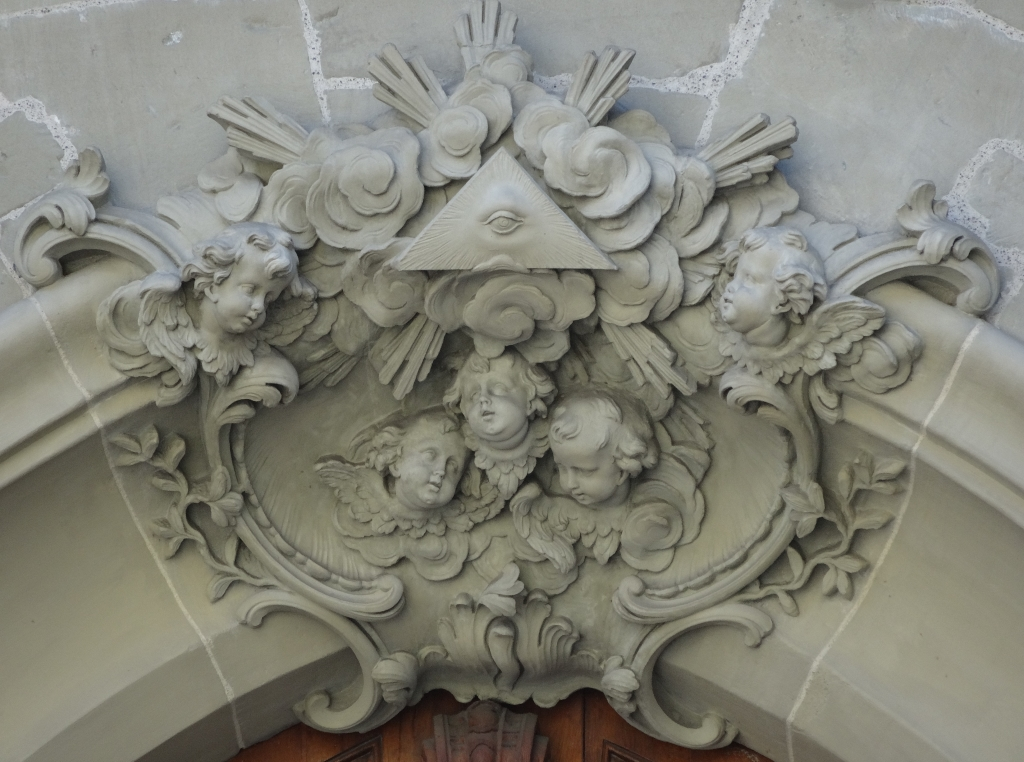 Cathédrale St-Nicolas de Fribourg (Suisse). Portail nord.